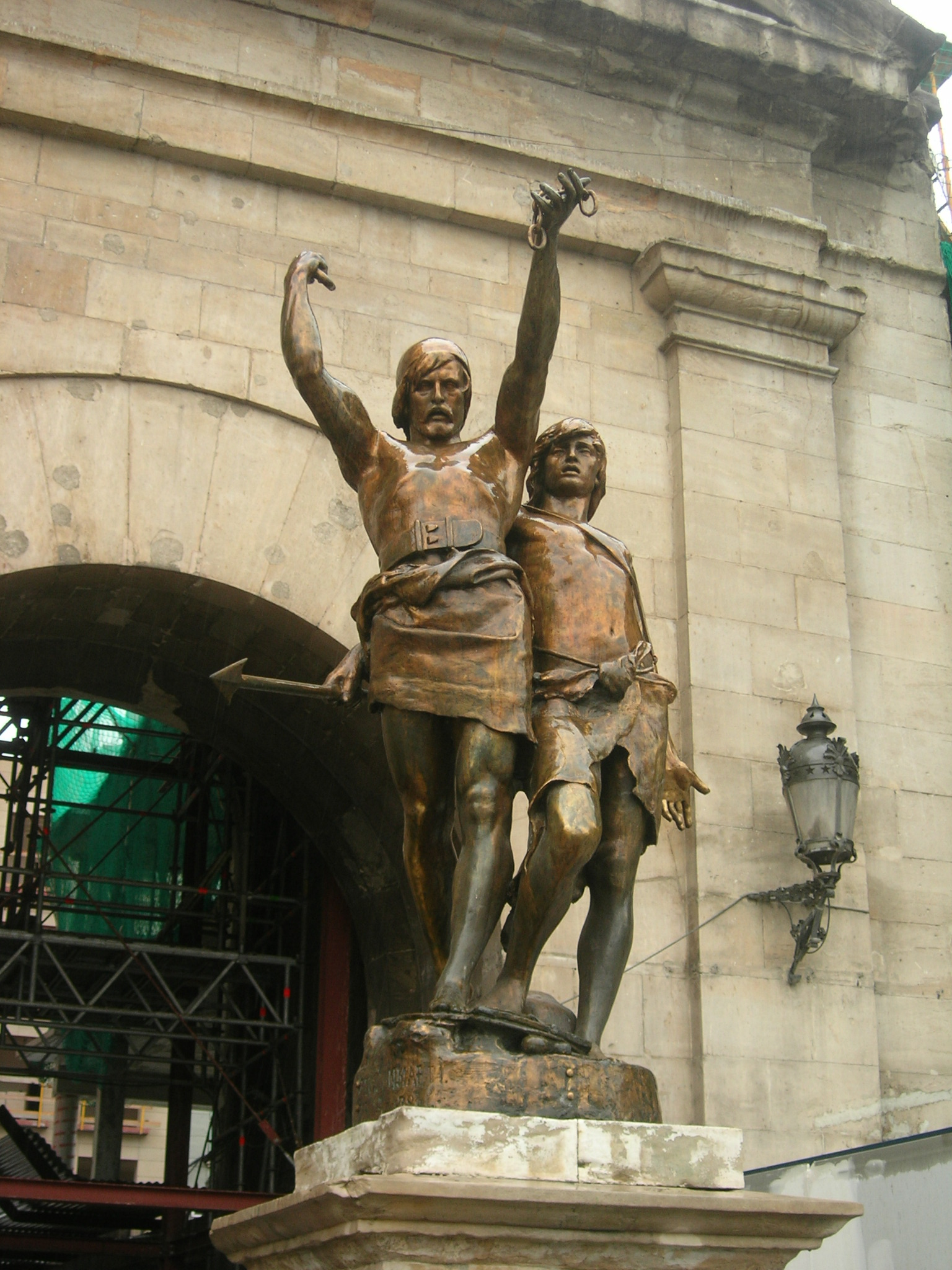 Estàtues d'Indíbil i Mandoni (Lleida)